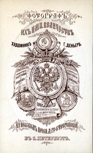 Паспарту Деньера